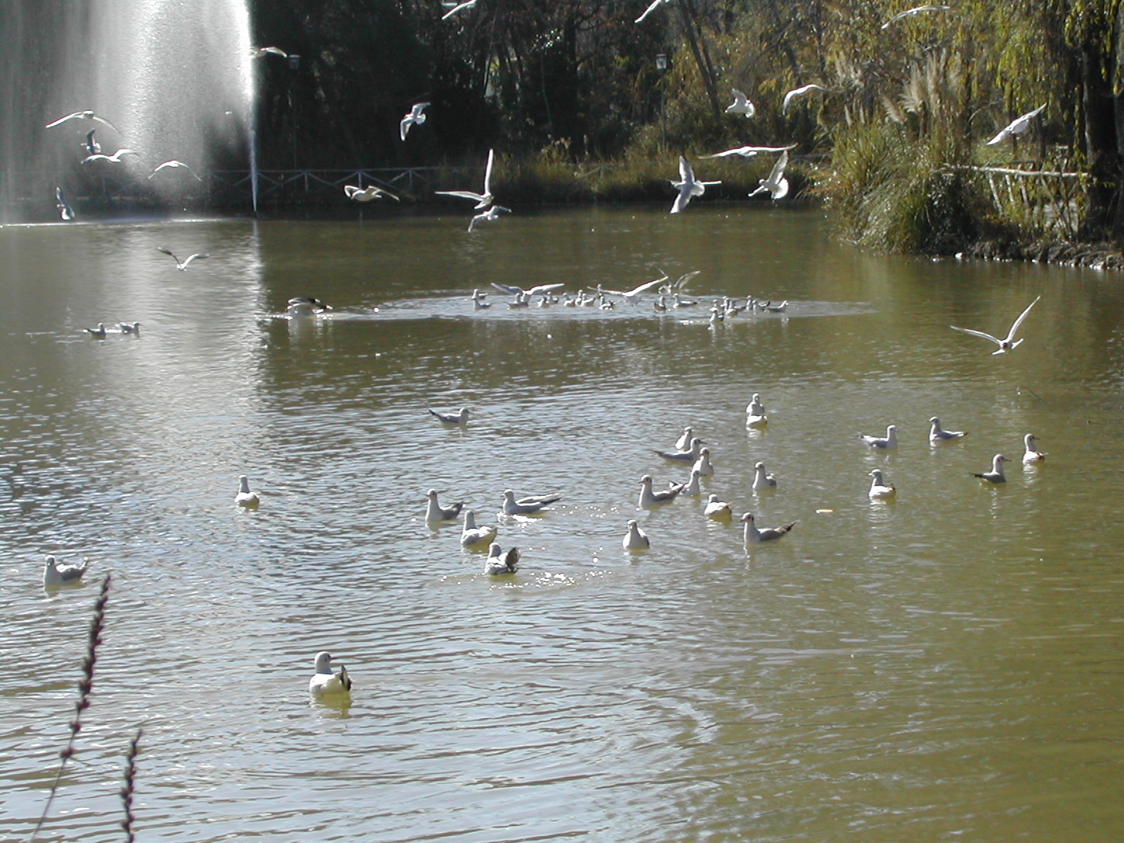 Pescara_Riserva_naturale_di_interesse_provinciale_Pineta_Dannunziana